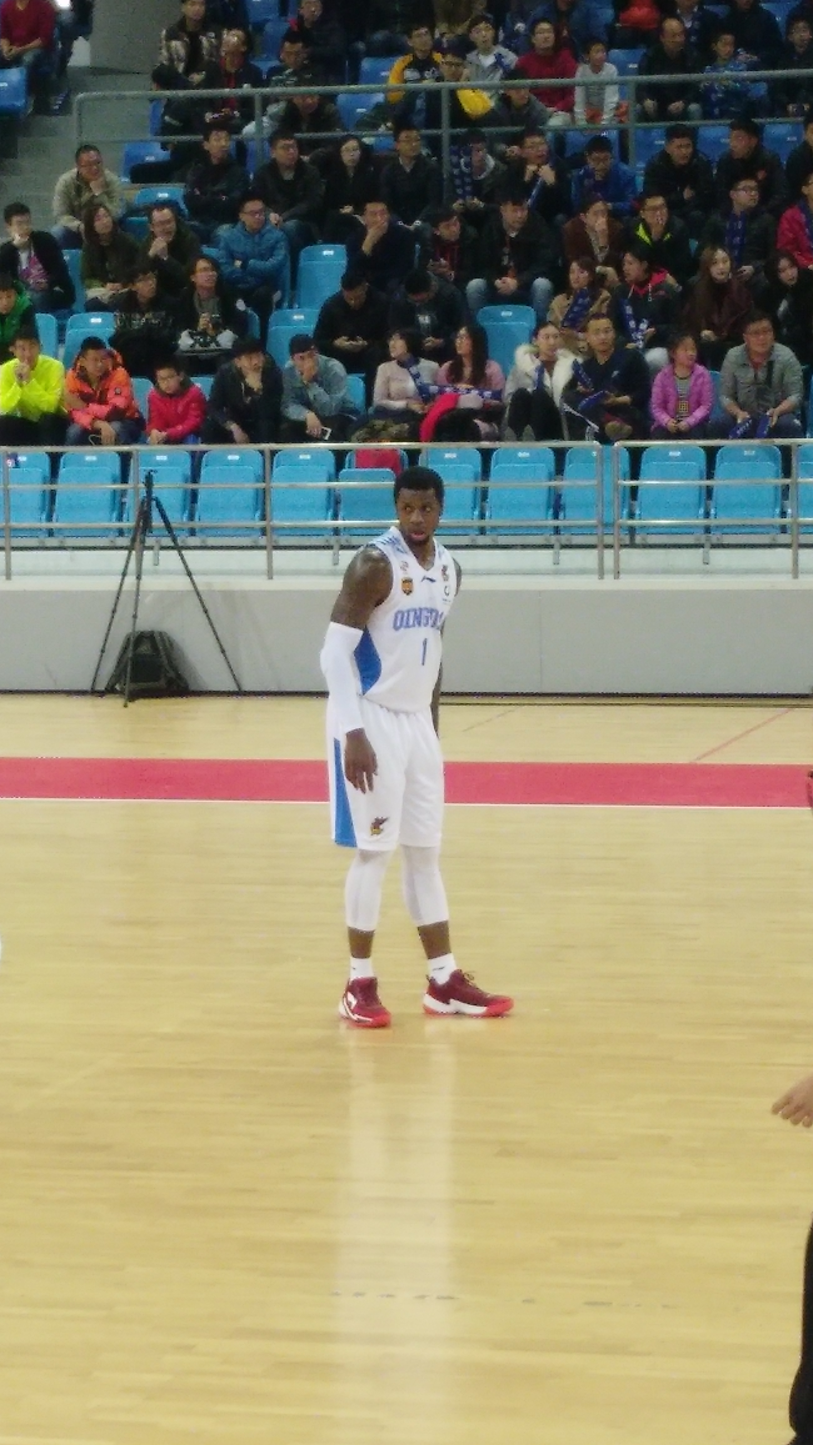 图中比赛为2017-2018赛季CBA常规赛第9轮青岛国信双星对阵东莞马可波罗。 在这场比赛中，特伦斯·琼斯共获得38分13篮板5助攻，最终青岛国信双星也以91比102负于东莞马可波罗